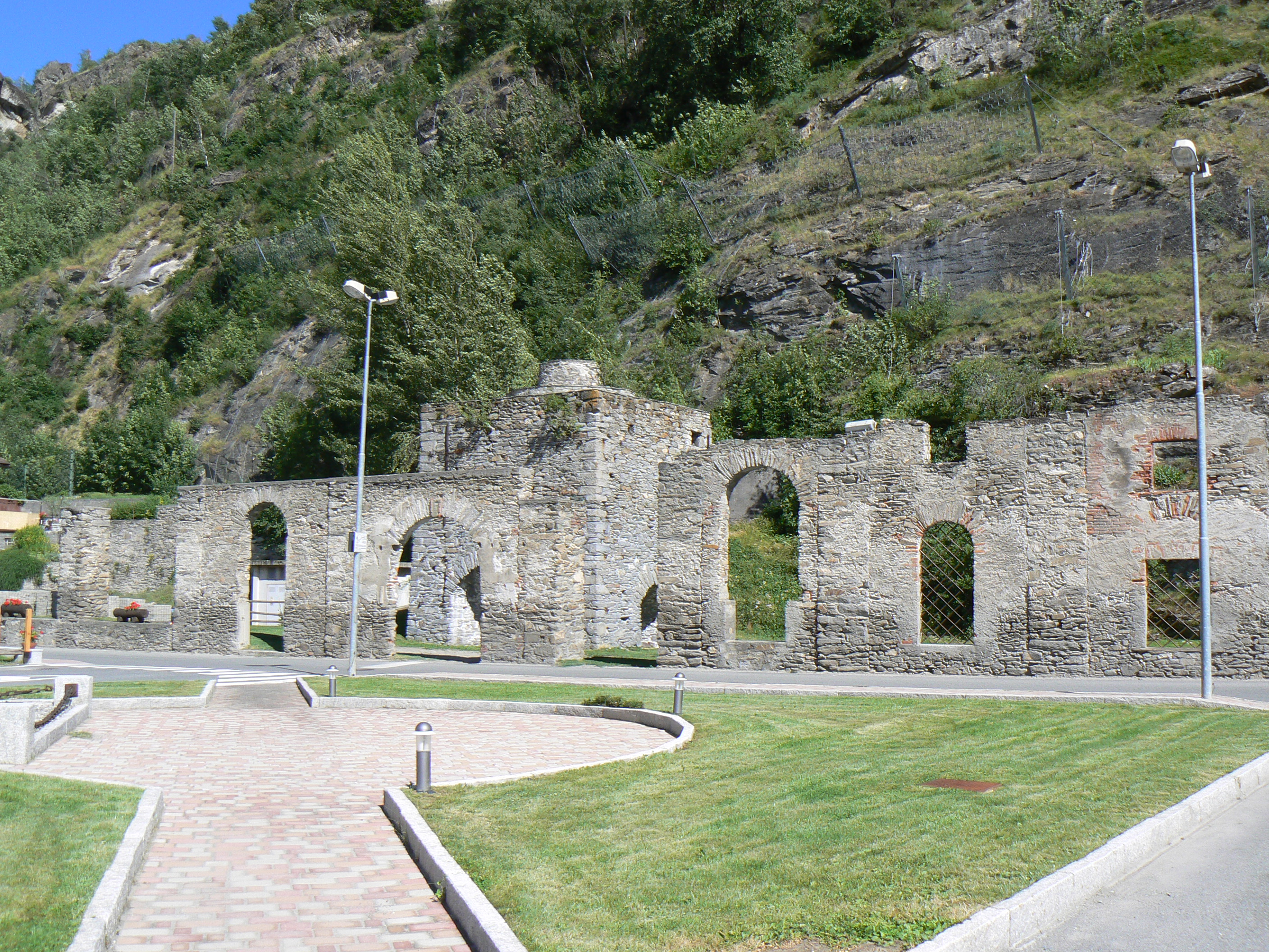 In località Martinet si trovano i resti di una fonderia ottocentesca tra cui spicca l'altoforno di 12 metri a carica dall'alto, ben conservato. La fonderia, oggi archeologia industriale a tutela della memoria storica del paese, lavorava il minerale proveniente dalle miniere di Cogne ed ebbe il suo massimo sviluppo con cento dipendenti sotto la guida dei mastri ferrai Gervasone.. Villeneuve, Valle d'Aosta, Italia.